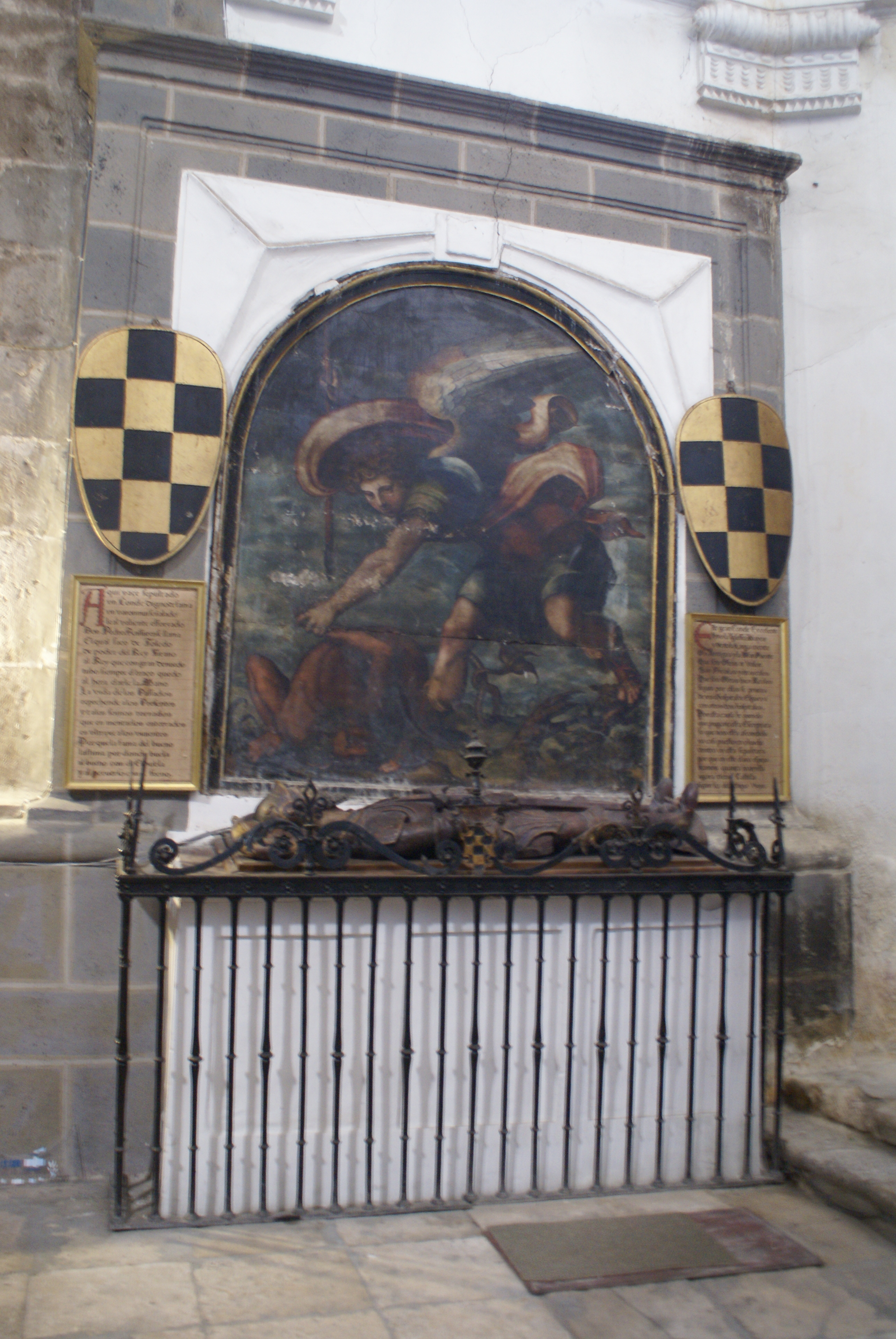 Sepulcro del conde Pedro Ansúrez (m. 1118) en la catedral de Valladolid. Procede de la colegiata de Valladolid, donde el conde fue enterrado a su muerte.